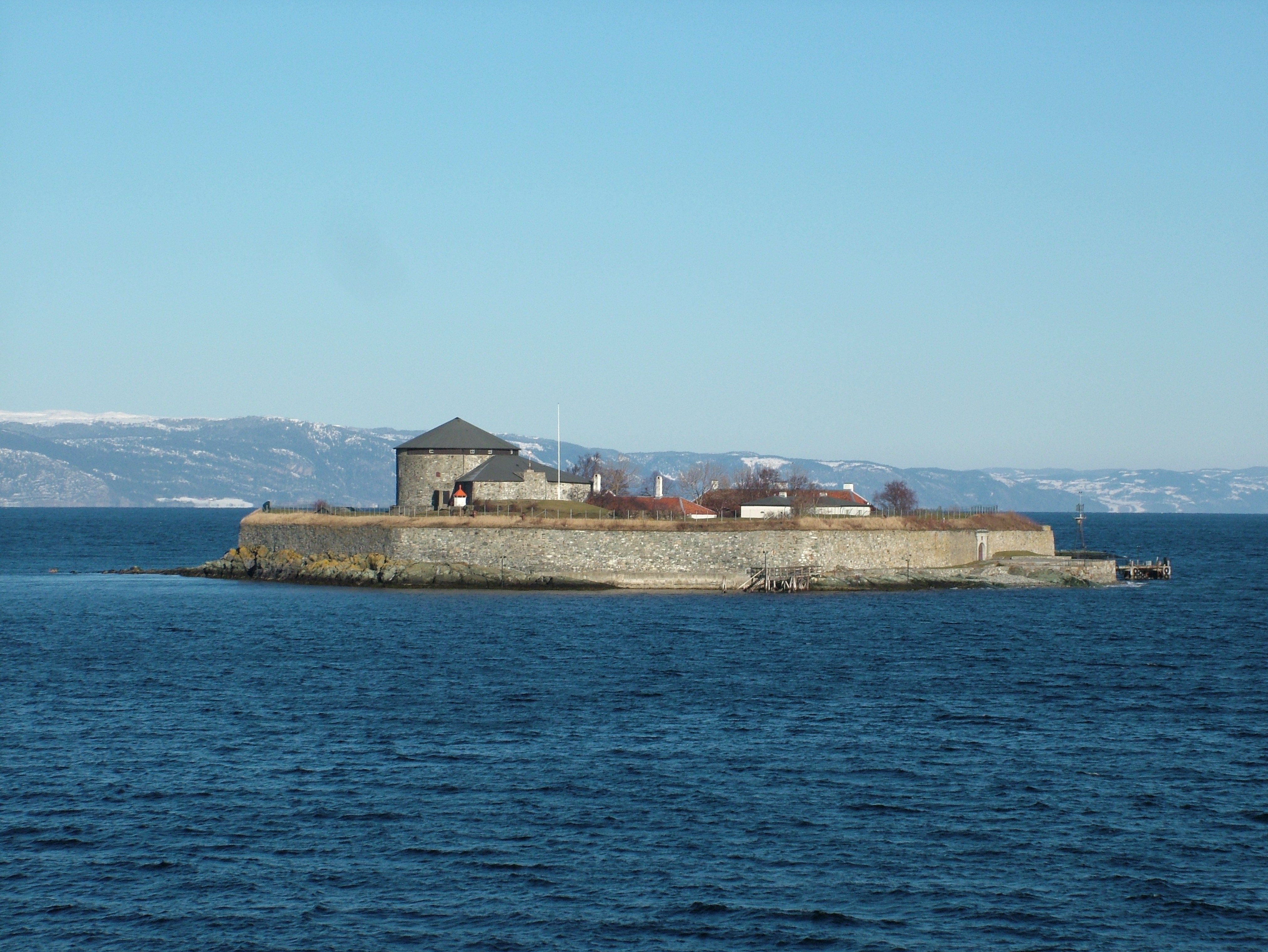 Die Festung Munkholmen vor Trondheim Norwergen.